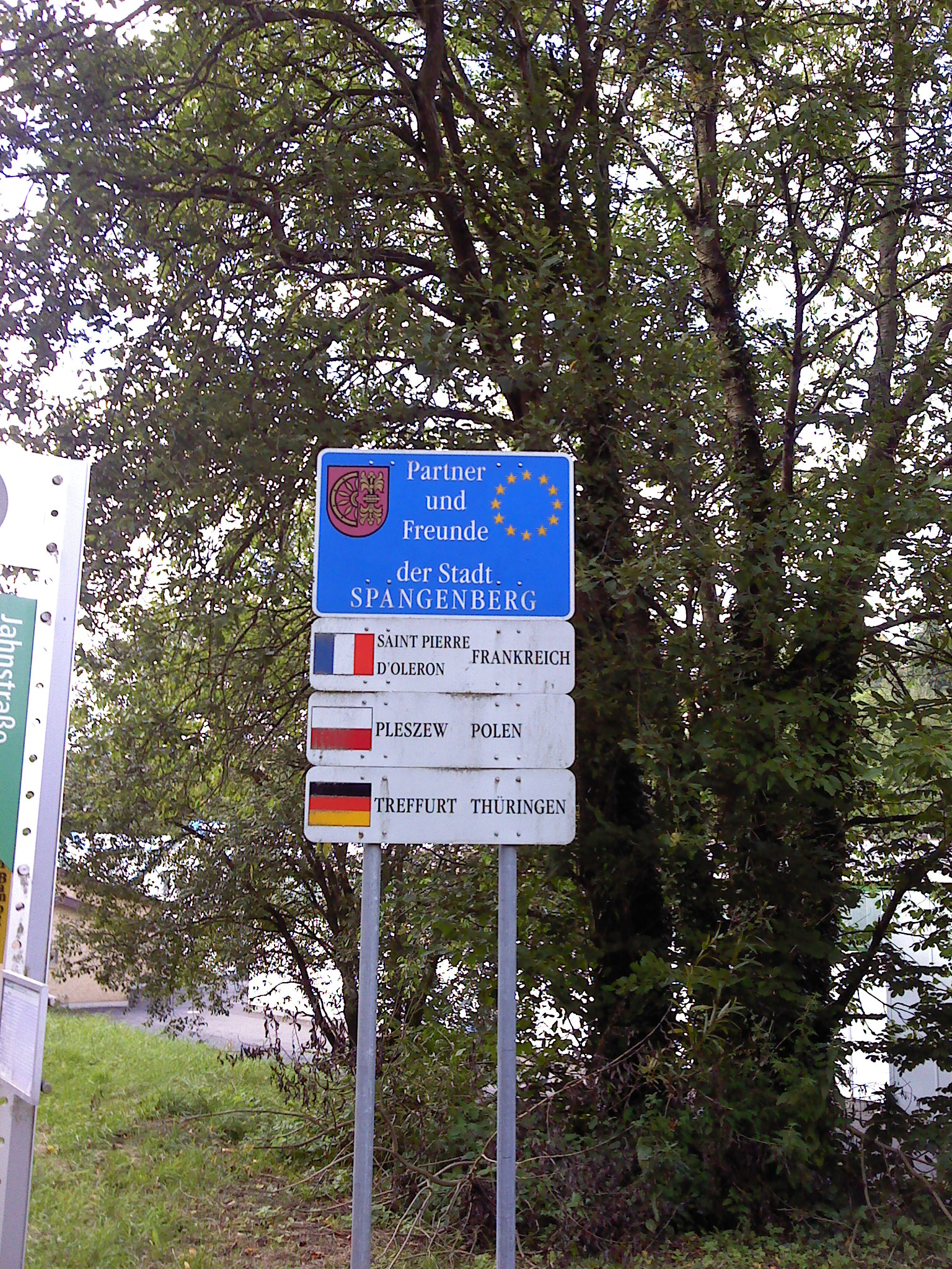 Schild mit den Spangenberger Partnerstädten am Ortseingang aus Richtung Pfieffe.